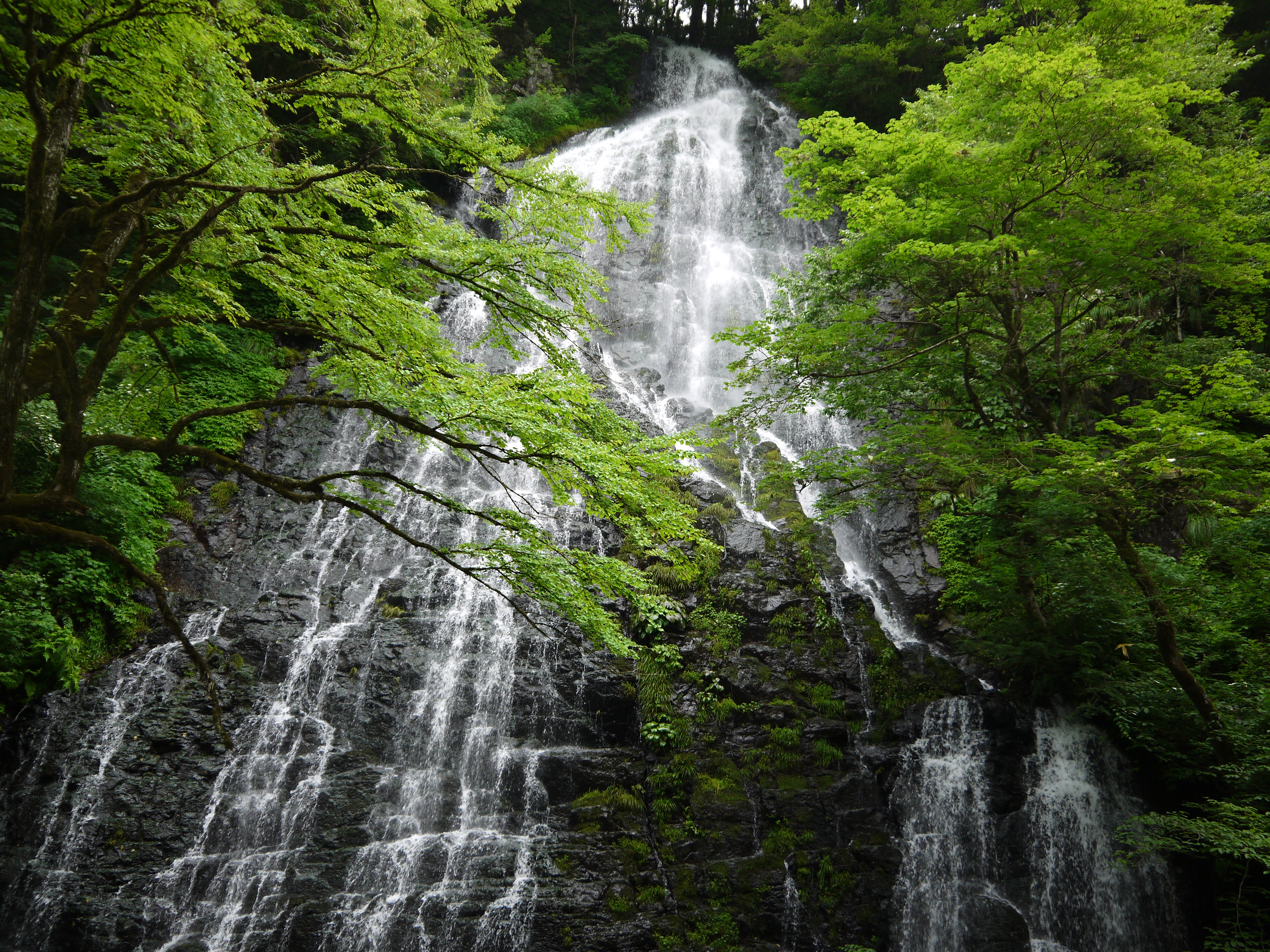 初夏の龍双ヶ滝